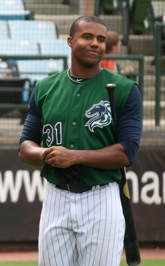 Stefan Gartrell